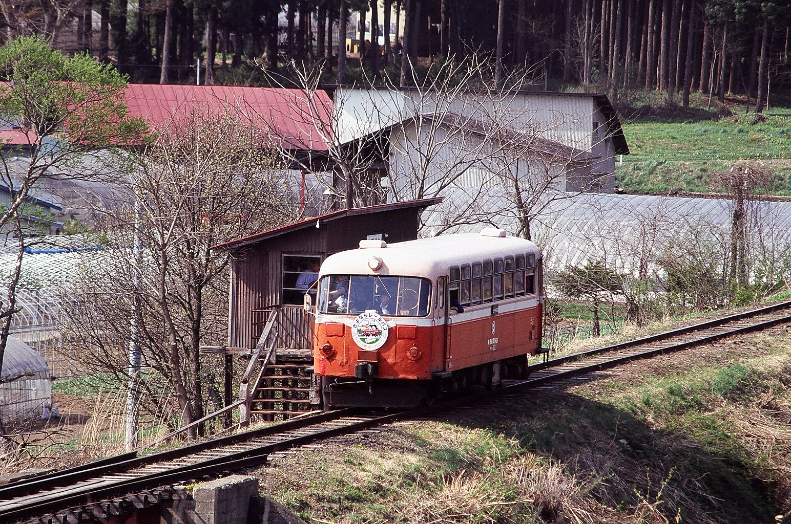 坪川駅に停車中のレールバス（1997年4月頃撮影）